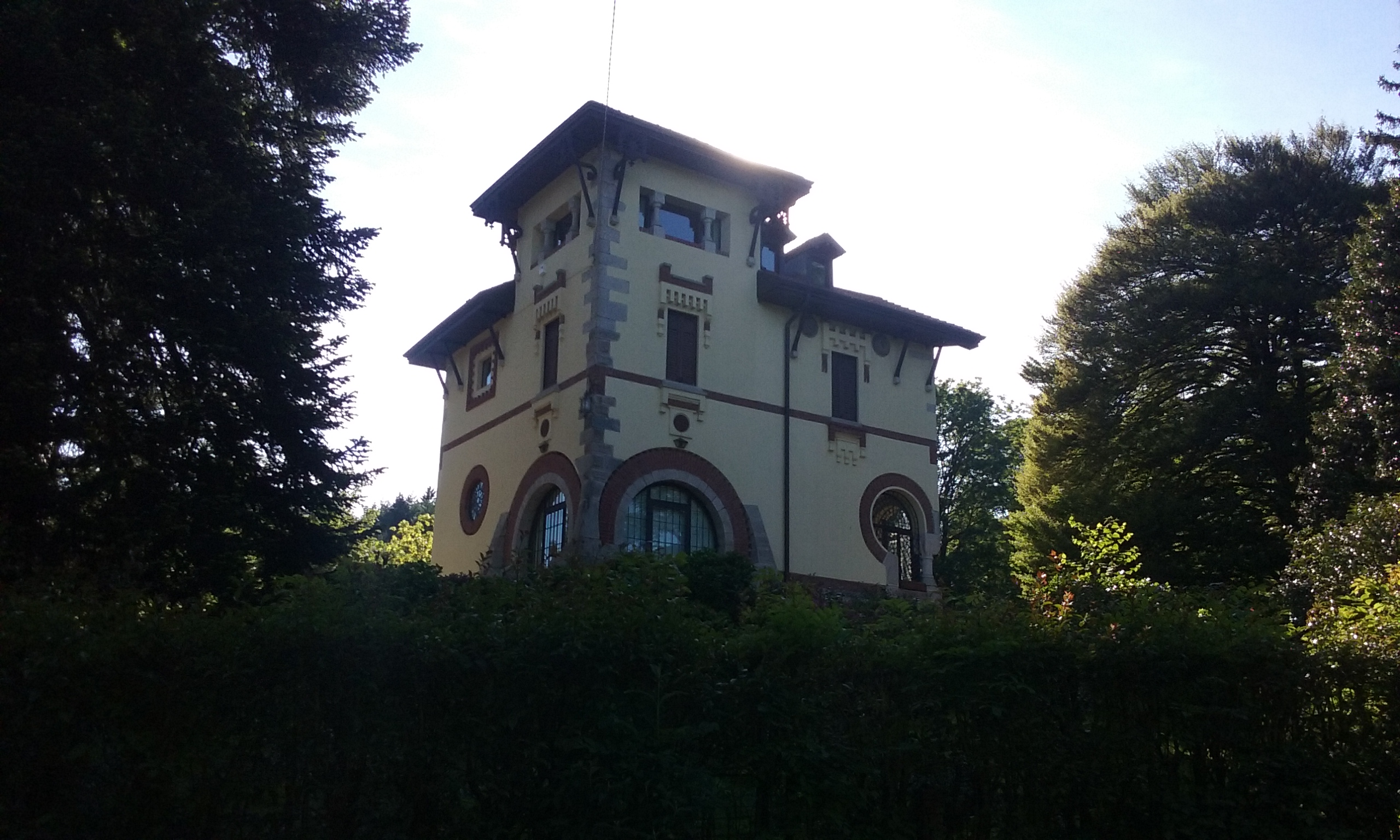 Località Alpino villa Dell'Orto